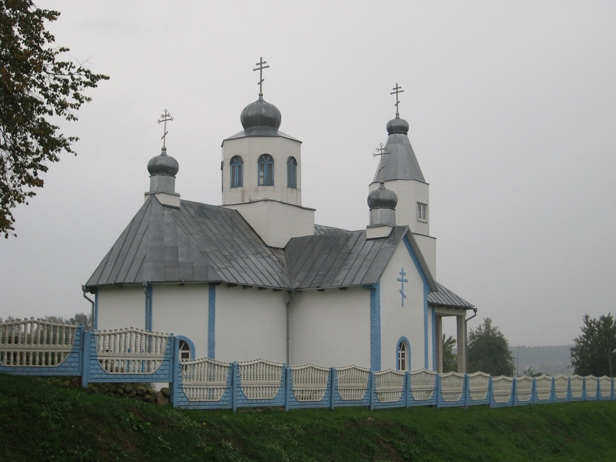 Засулле. Царква